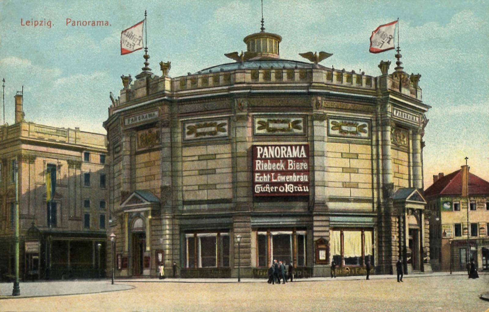 Das Panorama in Leipzig um 1900 (Postkarte)